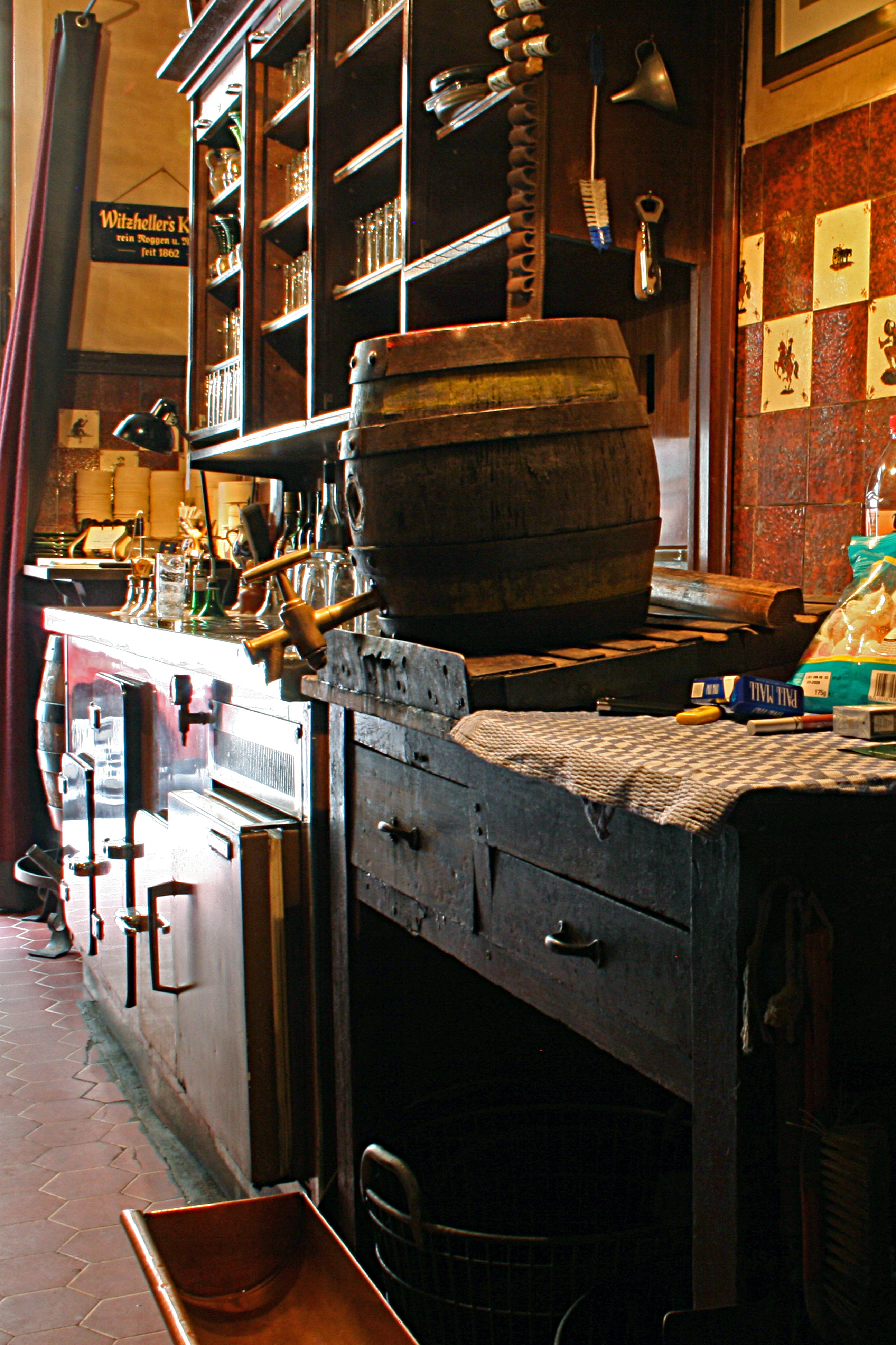 Fassbank, Haus Töller, Köln